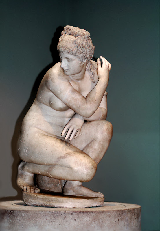 Afrodita.Es posible que fuera un encargo de Nicomedes I de Bitinia para un santuario en Nicomedia, ciudad que fundó ese rey en 265 ó 262 a. C.1​